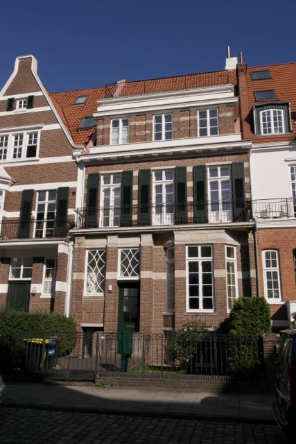 Haus Heye in Bremen, Lüder-von-Bentheim-Straße 23Das abgebildete Objekt ist ein geschütztes Kulturdenkmal in der Freien Hansestadt Bremen, mit der Nr. 0848 beim Landesamt für Denkmalpflege registriert.